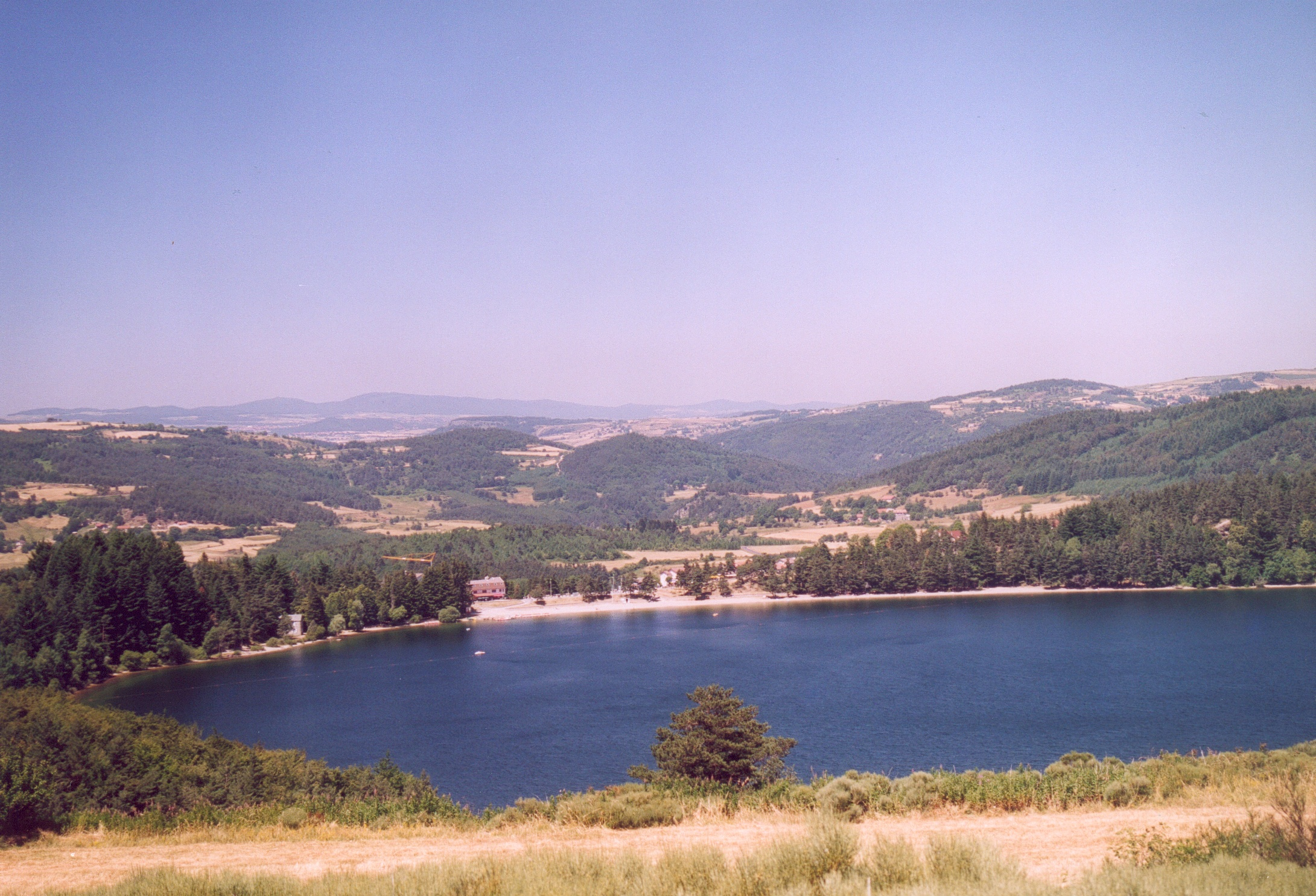 France Ardèche Le Lac-d'Issarlès Photographie prise par GIRAUD Patrick